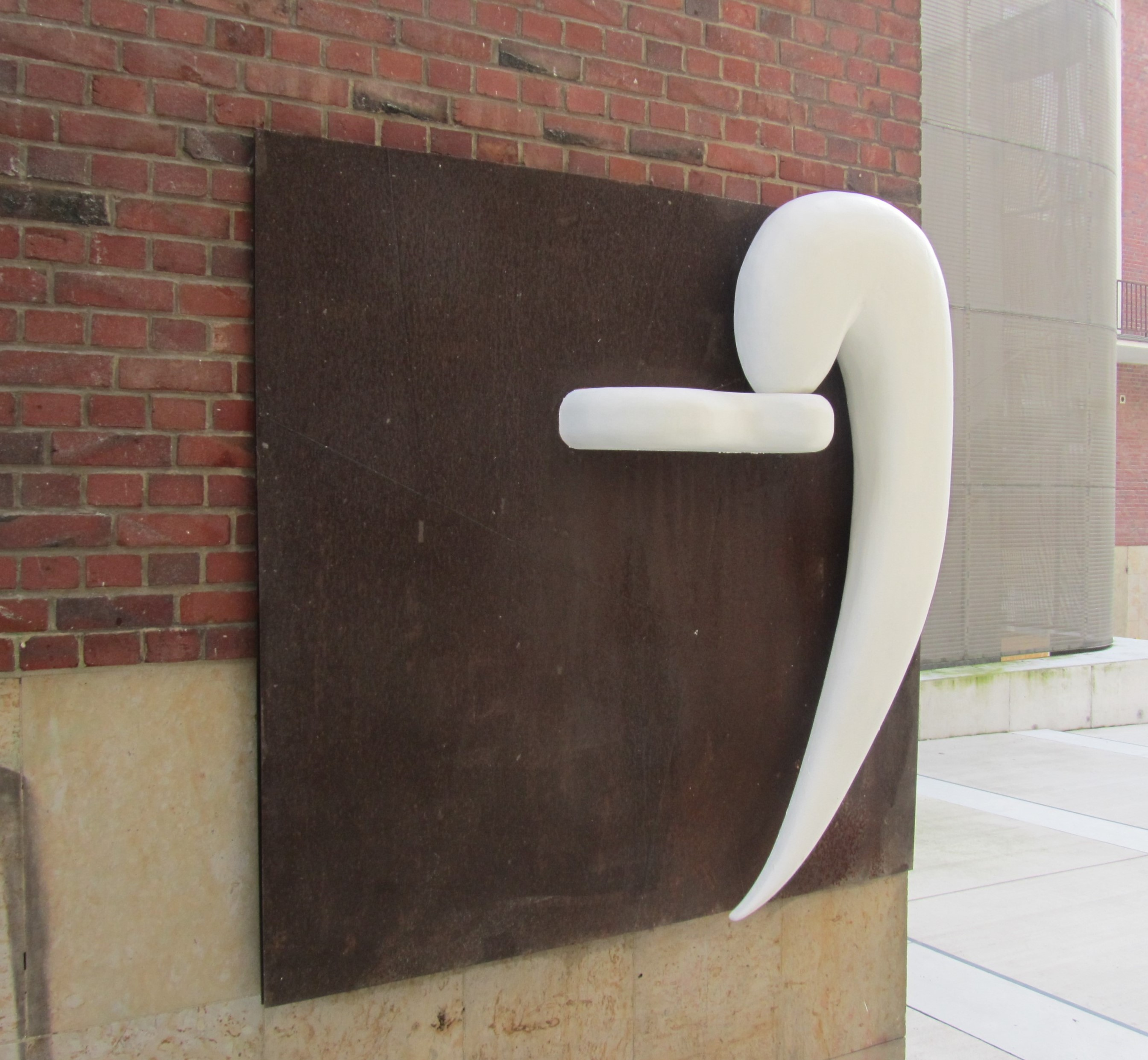 Richard Tuttle: Art and Music I, 1987, Stahl und Holz, 200 x 200 x 30 cm, Standort: Münster, Domplatz/Fürstenberghaus, einer von zwei Teilen einer Skulptur im Rahmen der "Skulptur.Projekte 1987", Münster